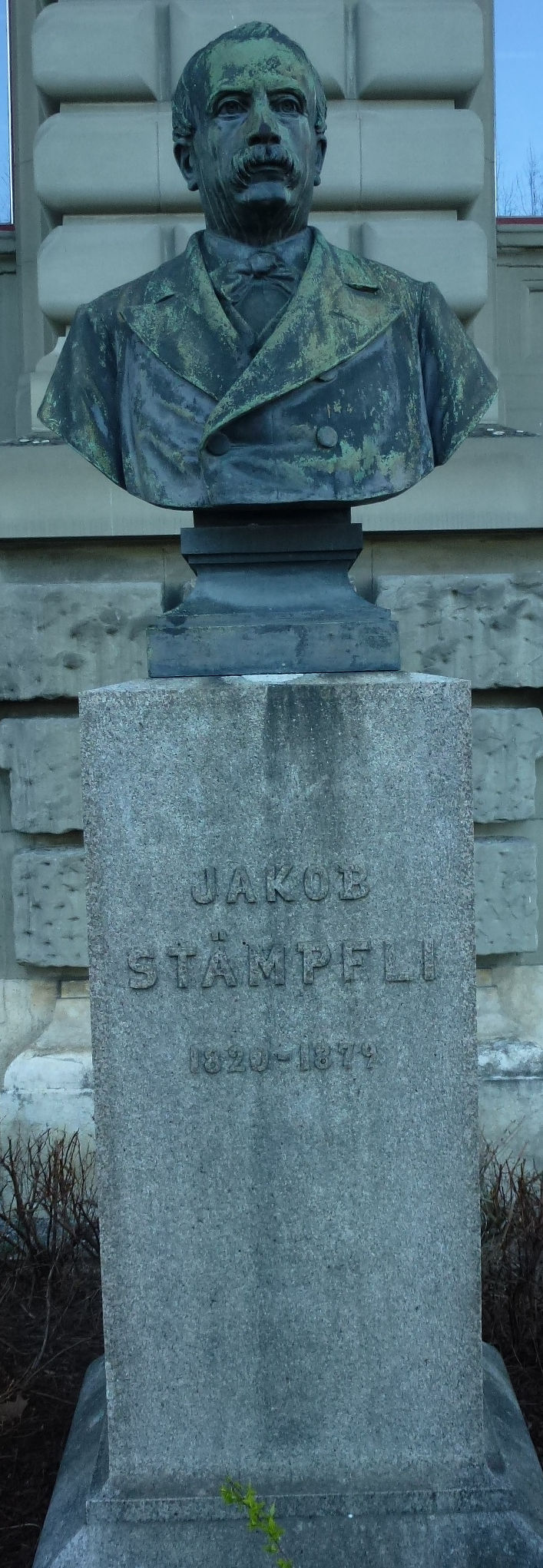 Stämpfli-Büste vor der Universität Bern